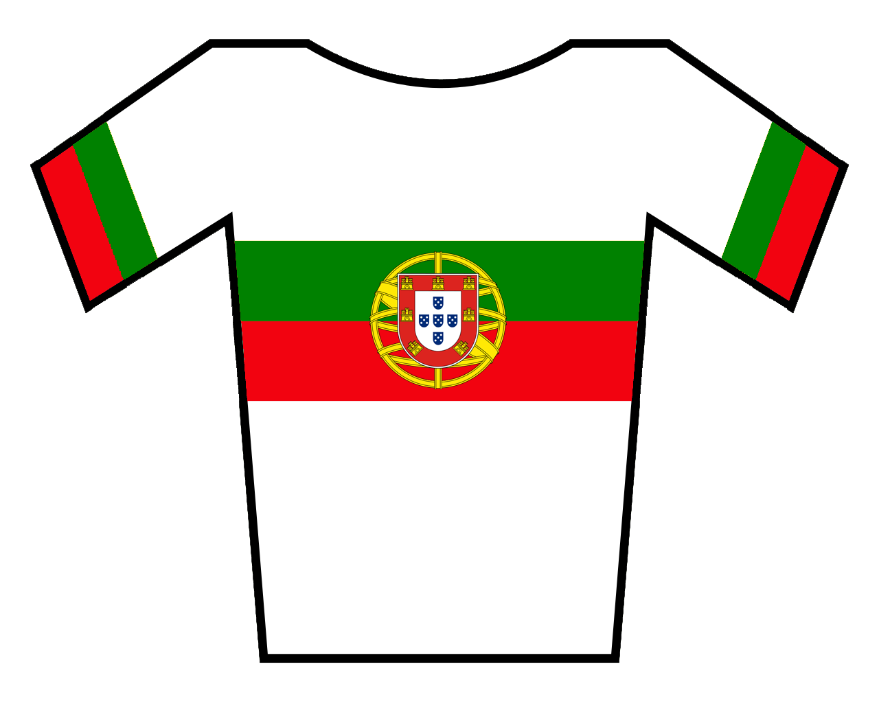 Maillot de Portugal